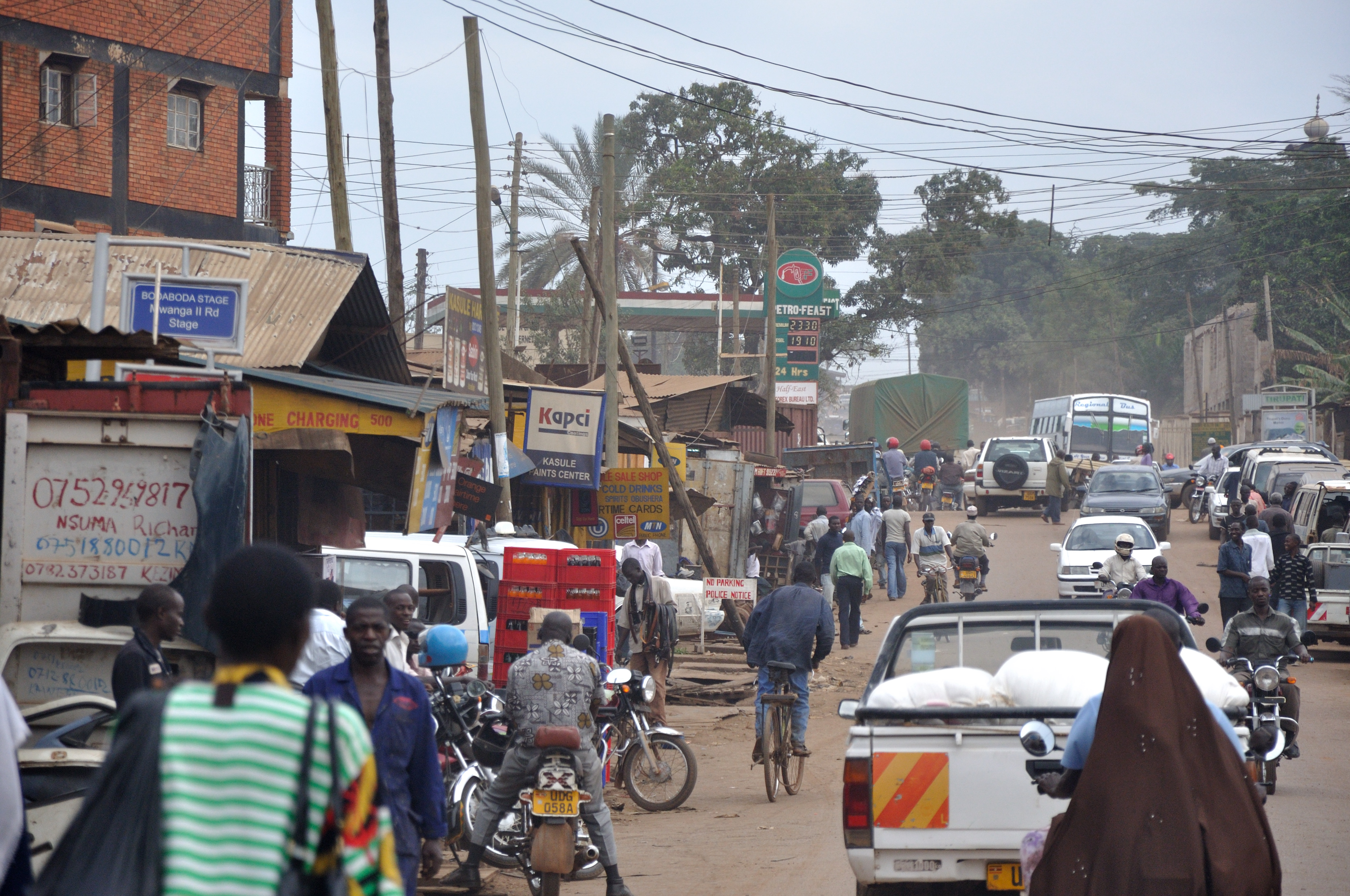 Uganda, Street views in Kampala